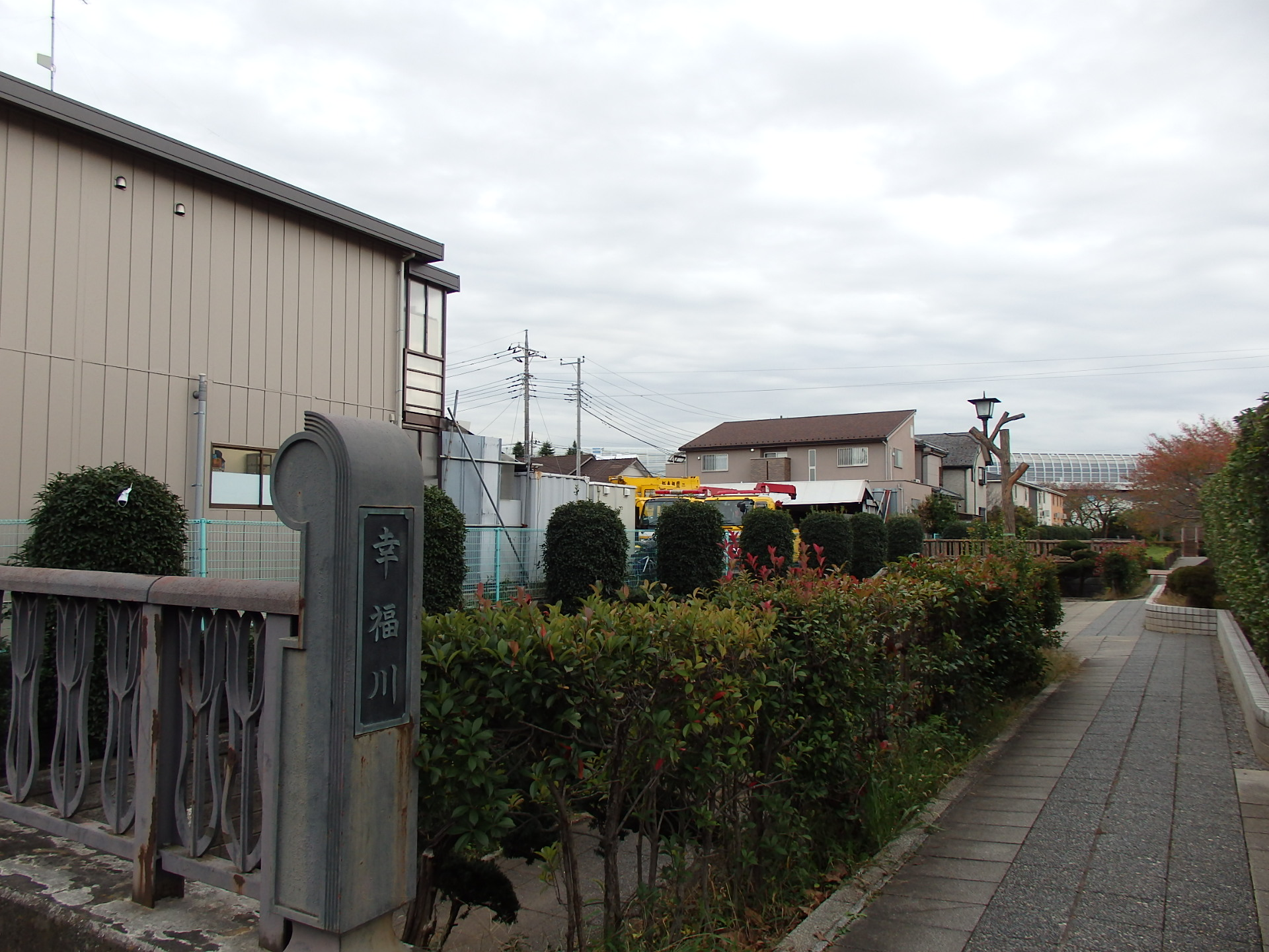 幸福川上流